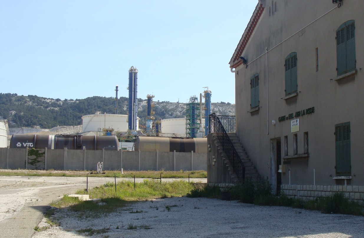 La gare de Bel-Air-la Mède et les installations ferroviaires de la société Total, desservies par la RDT13.